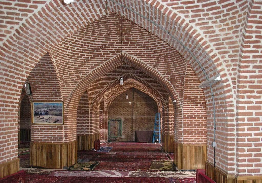 مسجد جامع اهر در استان آذر بایجان شرقی